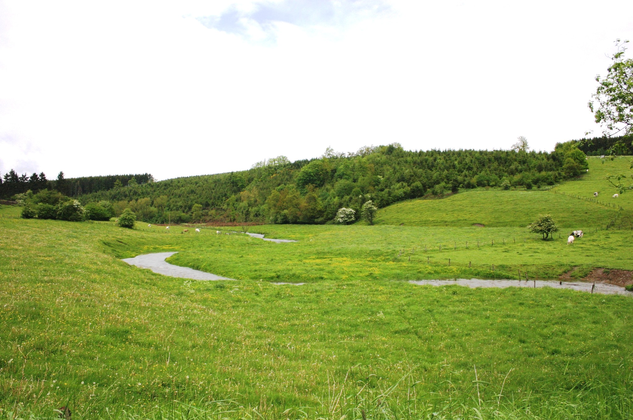 Sauer bei Winville.